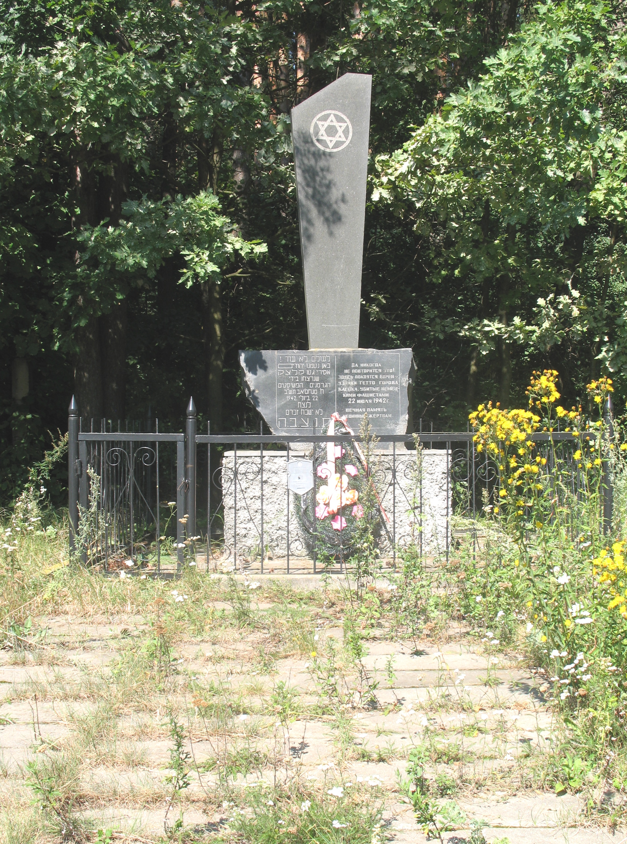 Памятник евреям Клецка, убитым нацистами 22 июля 1942 года. Находится в урочище Старина.